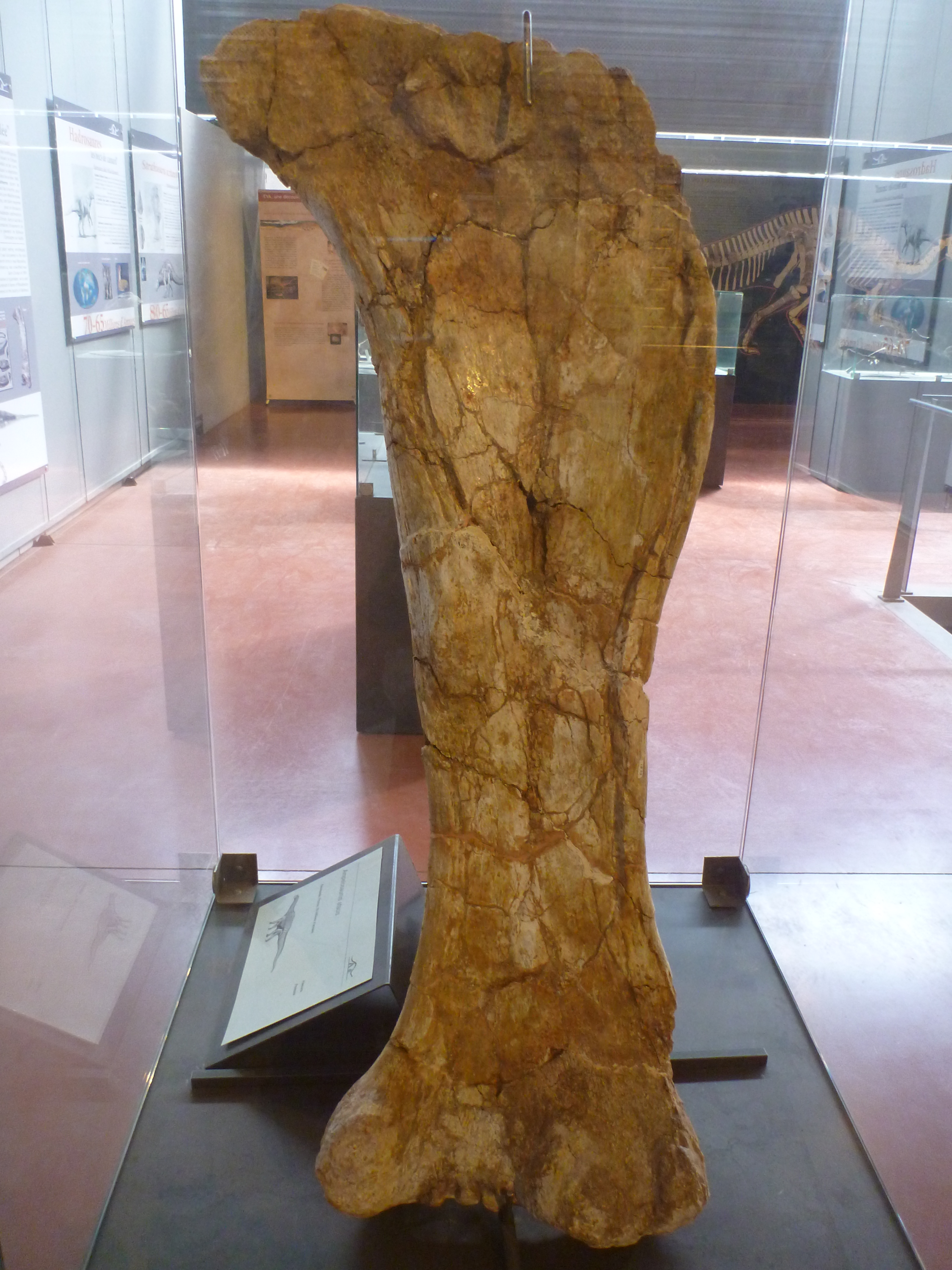 Ampelosaurus femur, on display at the Musée des dinosaures, Esperaza, France